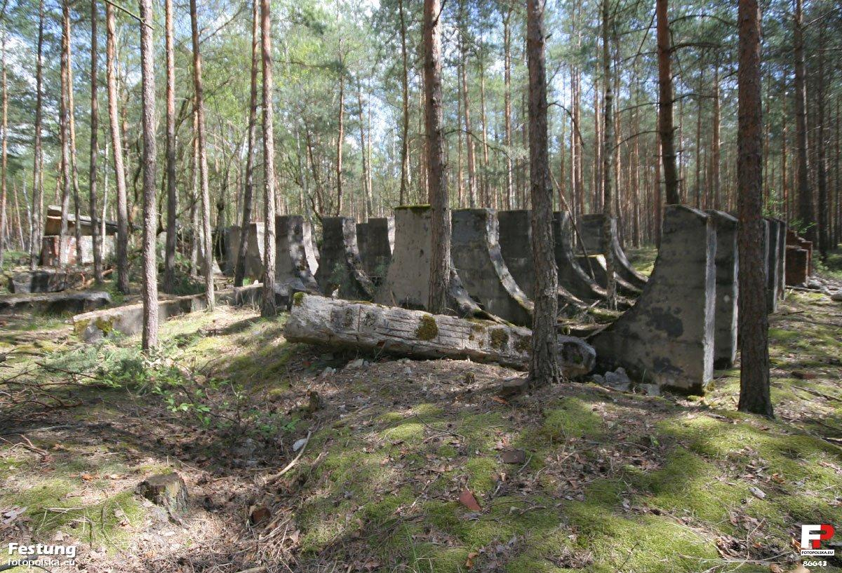 Mocowania zewnętrznych walczaków – potężnych zbiorników na komponenty materiałów wybuchowych. Do produkcji prochu bezdymnego (trójnitrocelulozy) i trotylu (trinitrotoluenu) używana jest tzw. mieszanka nitrująca, tj. mieszanina kwasów azotowego i siarkowego, stąd te kobylaste walczaki. W ogóle, to otrzymywanie materiałów pirotechnicznych jest banalne, nie wymagające specjalnie skomplikowanych procesów chemicznych. Największym problemem jest zapewnienie bezpieczeństwa produkcji.